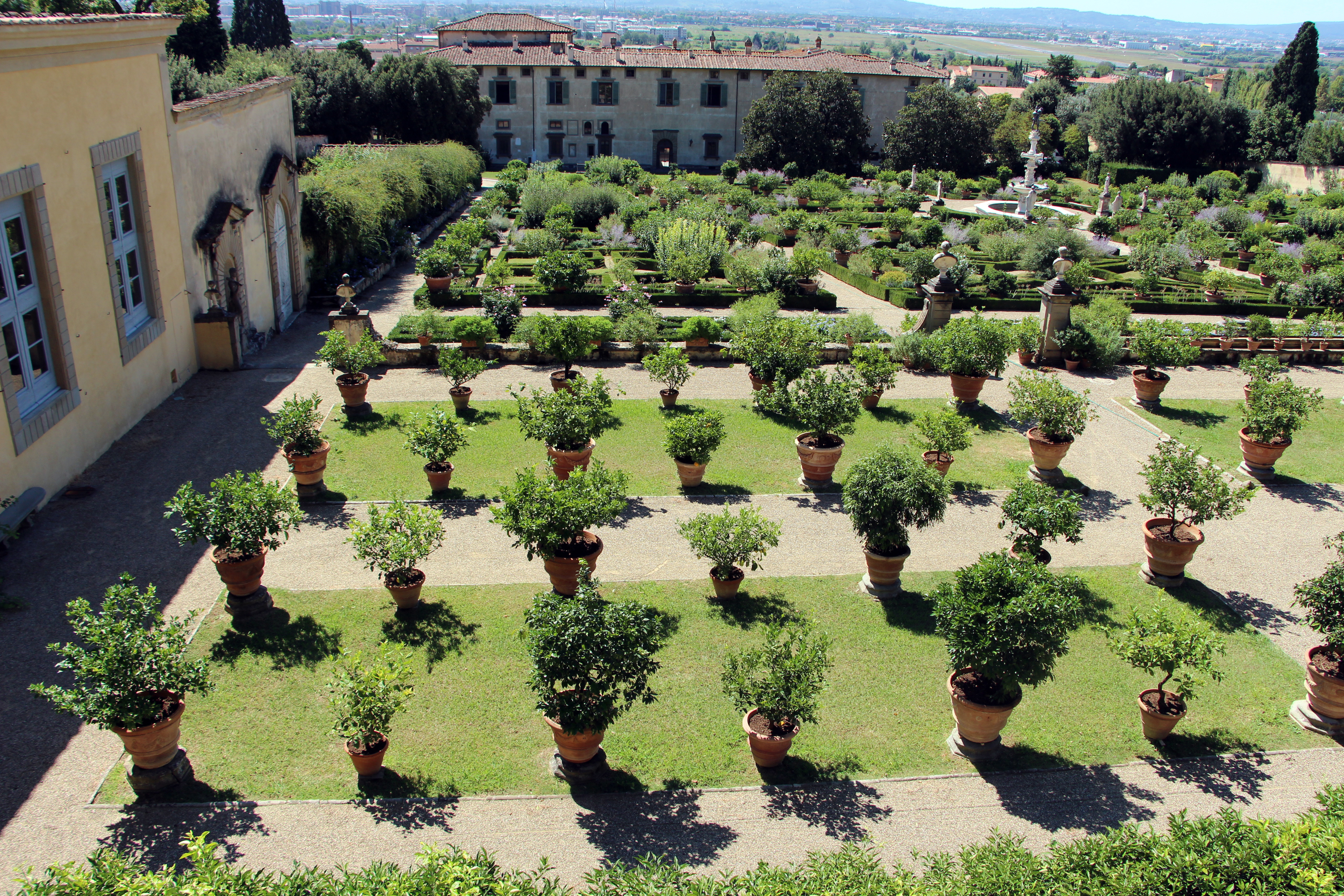 Giardino della Villa medicea di Castello - MIBAC This is a photo of a monument which is part of cultural heritage of Italy.